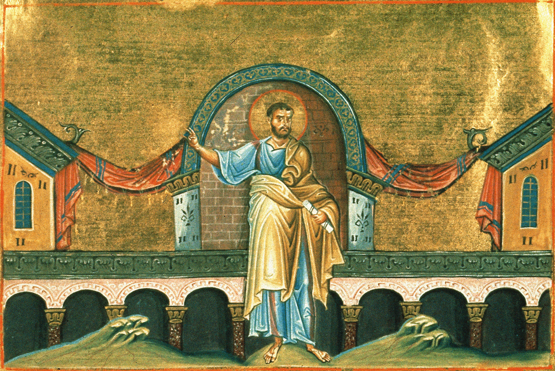 Ахия Силомлянин, пророк